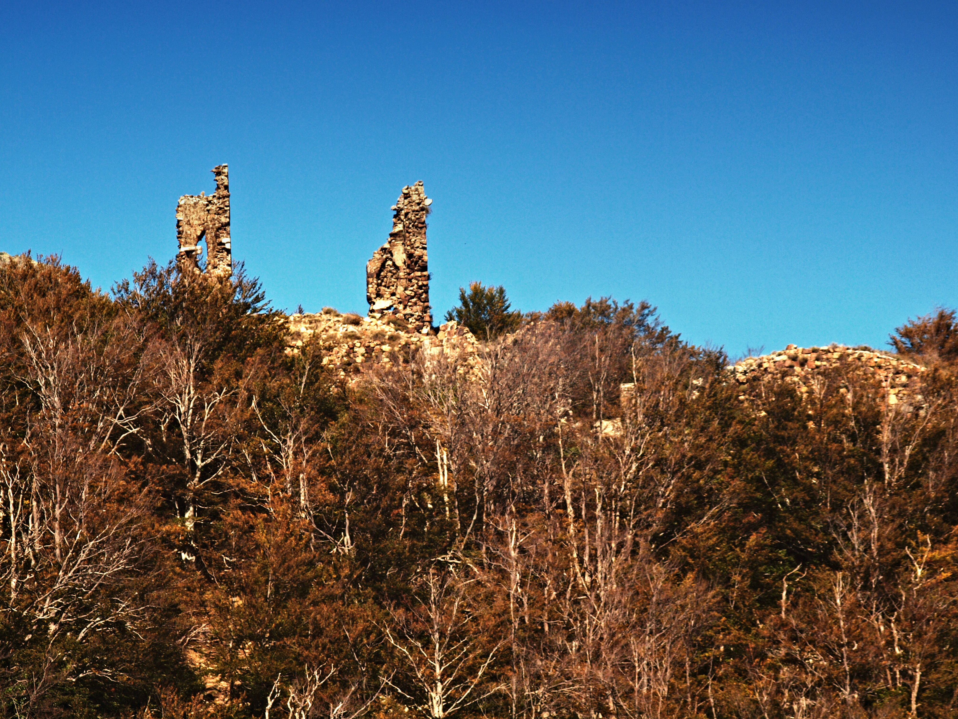 Vivario (Corsica) - Ruines du fort De Vaux au col de Vizzavona